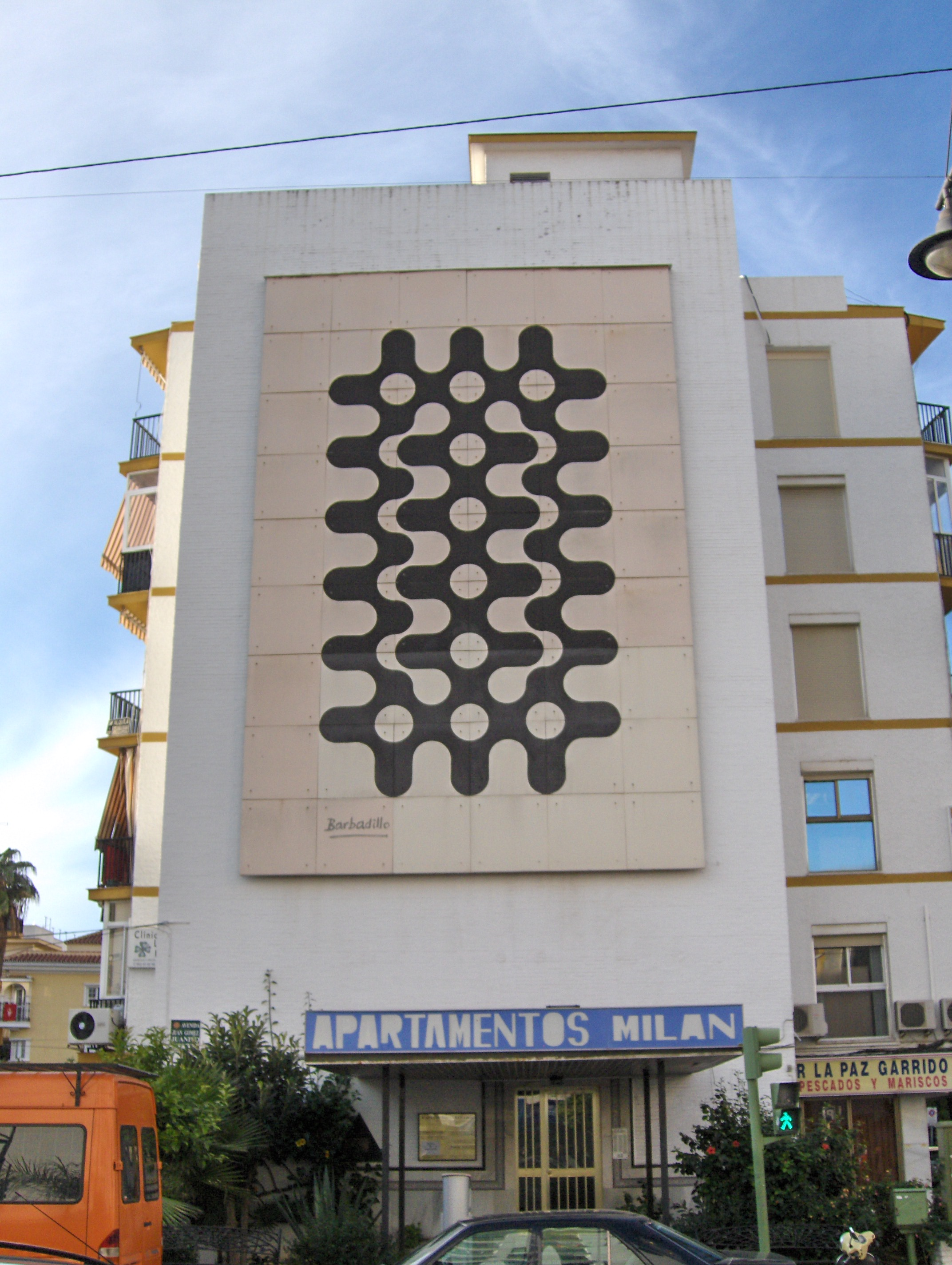 Mural de Manuel Barbadillo en Fuengirola. Museo Abierto, Fuengirola, España.